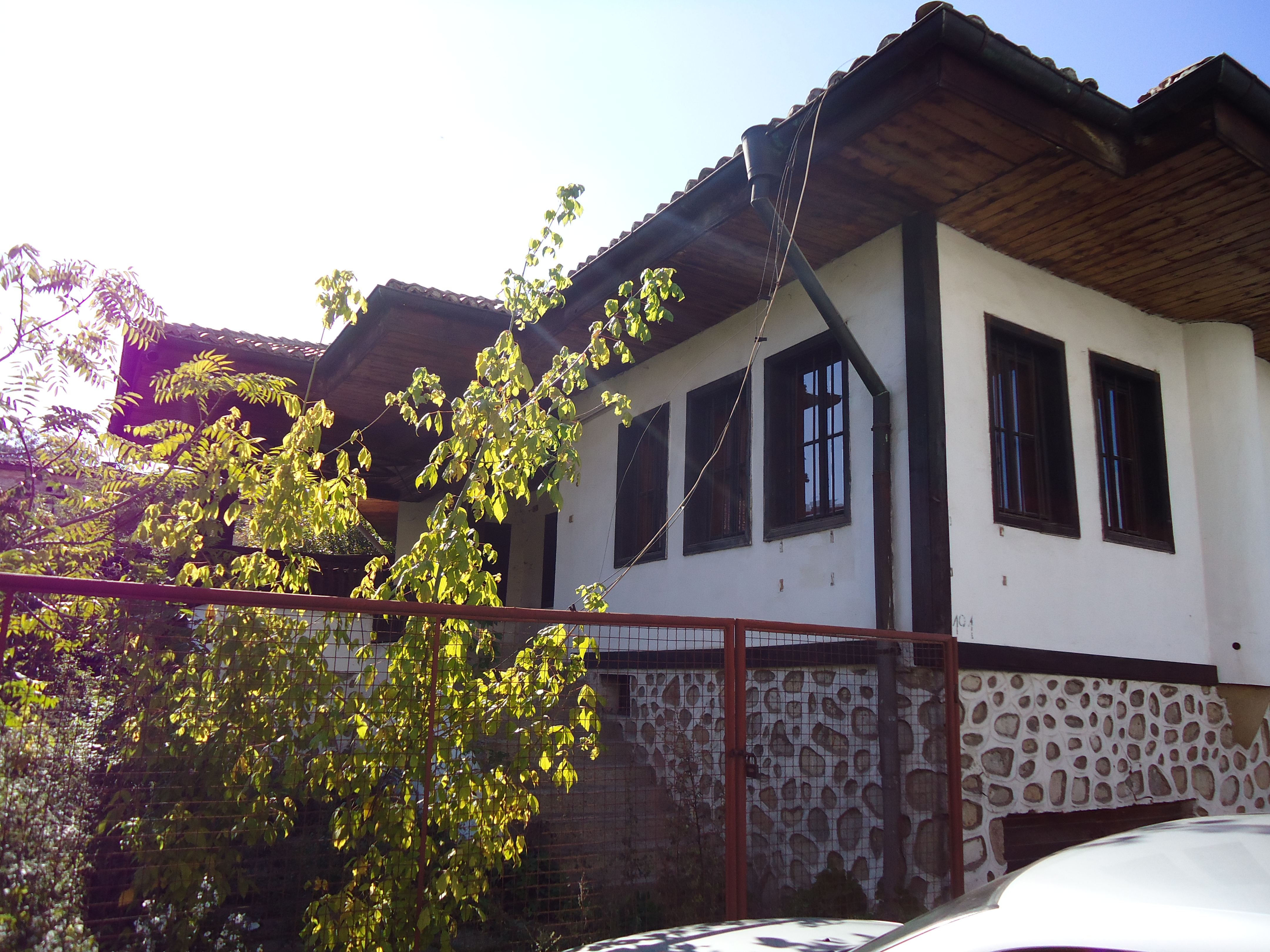 къщата на Тонче Кадинмостки в Кюстендил